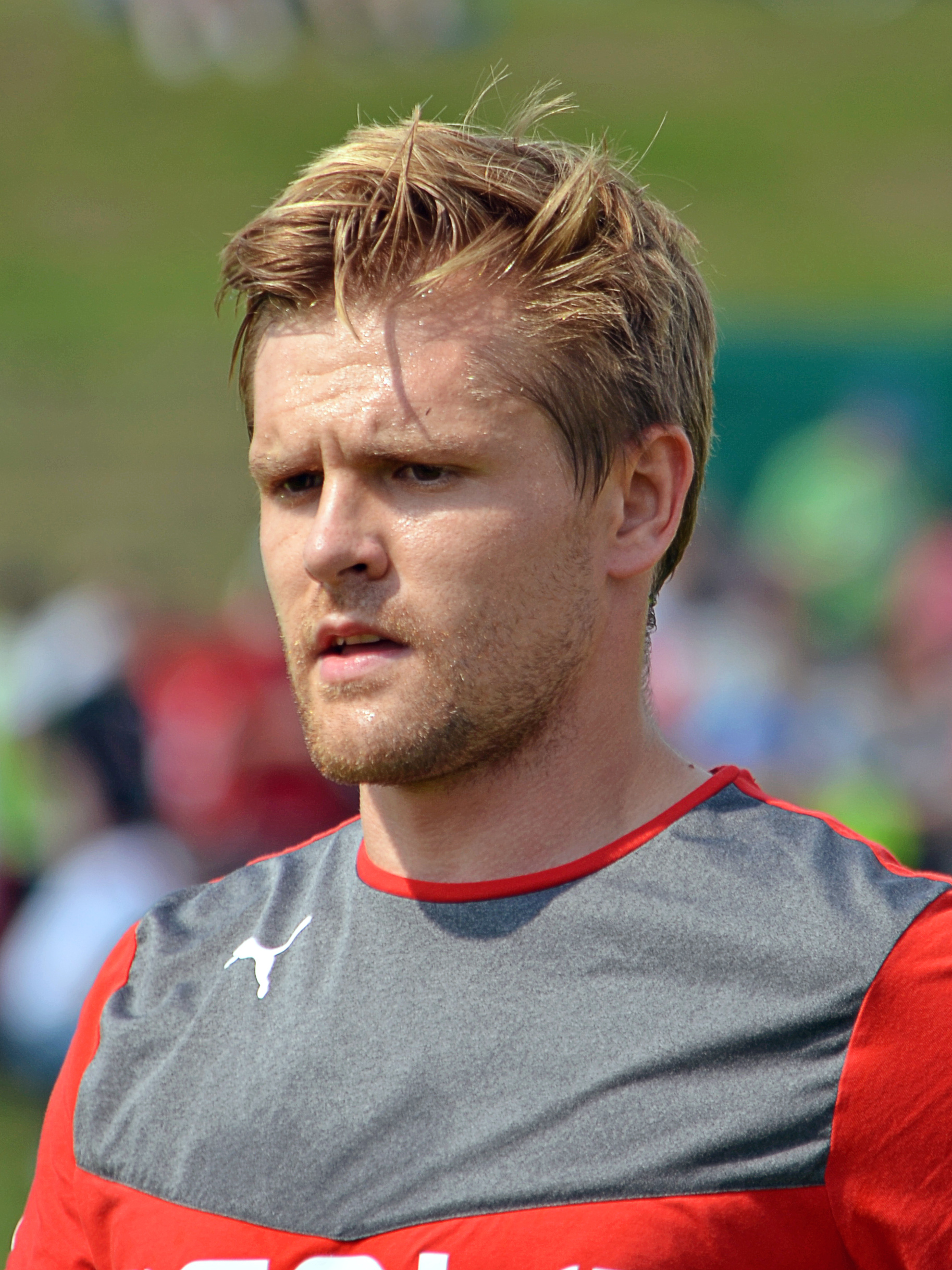 Heinrich Schmidtgal, kasachischer Fußballspieler.